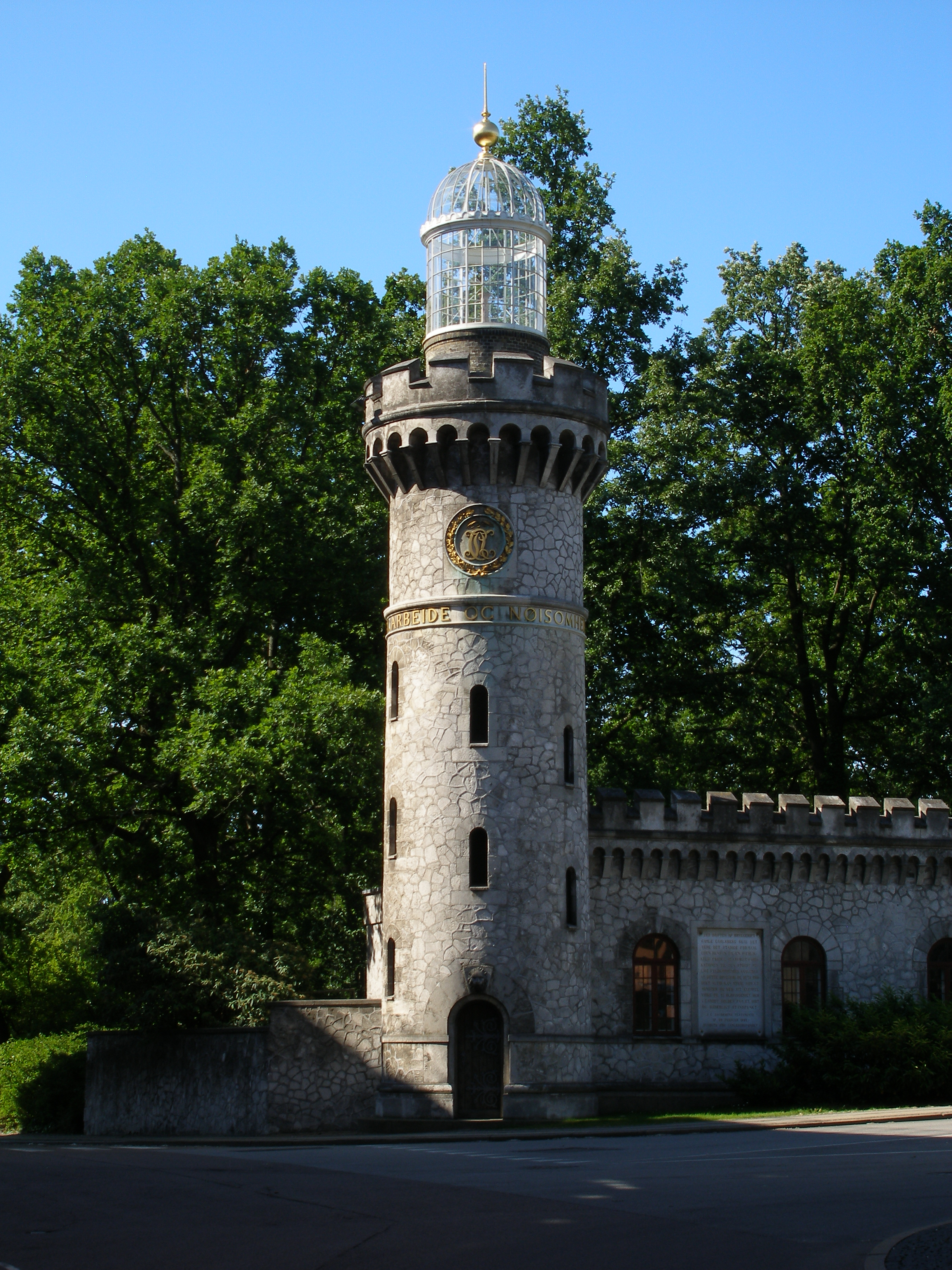 Gamle Carlsberg Fyrtårn. Arkitekt P.C. Bønecke